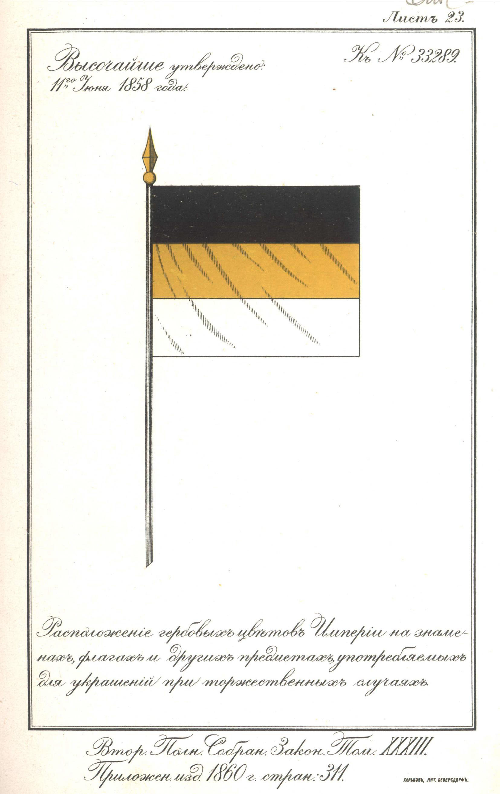 Приложение к указу Александра II от 11 июня 1858 г.